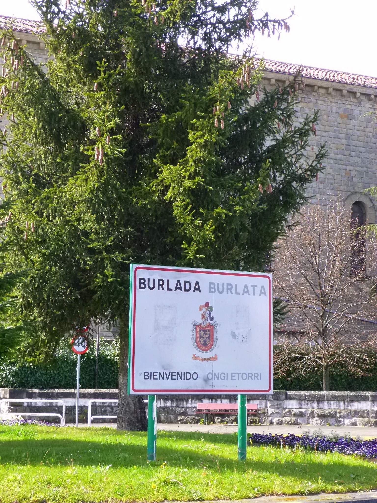 Burlada (Navarra)